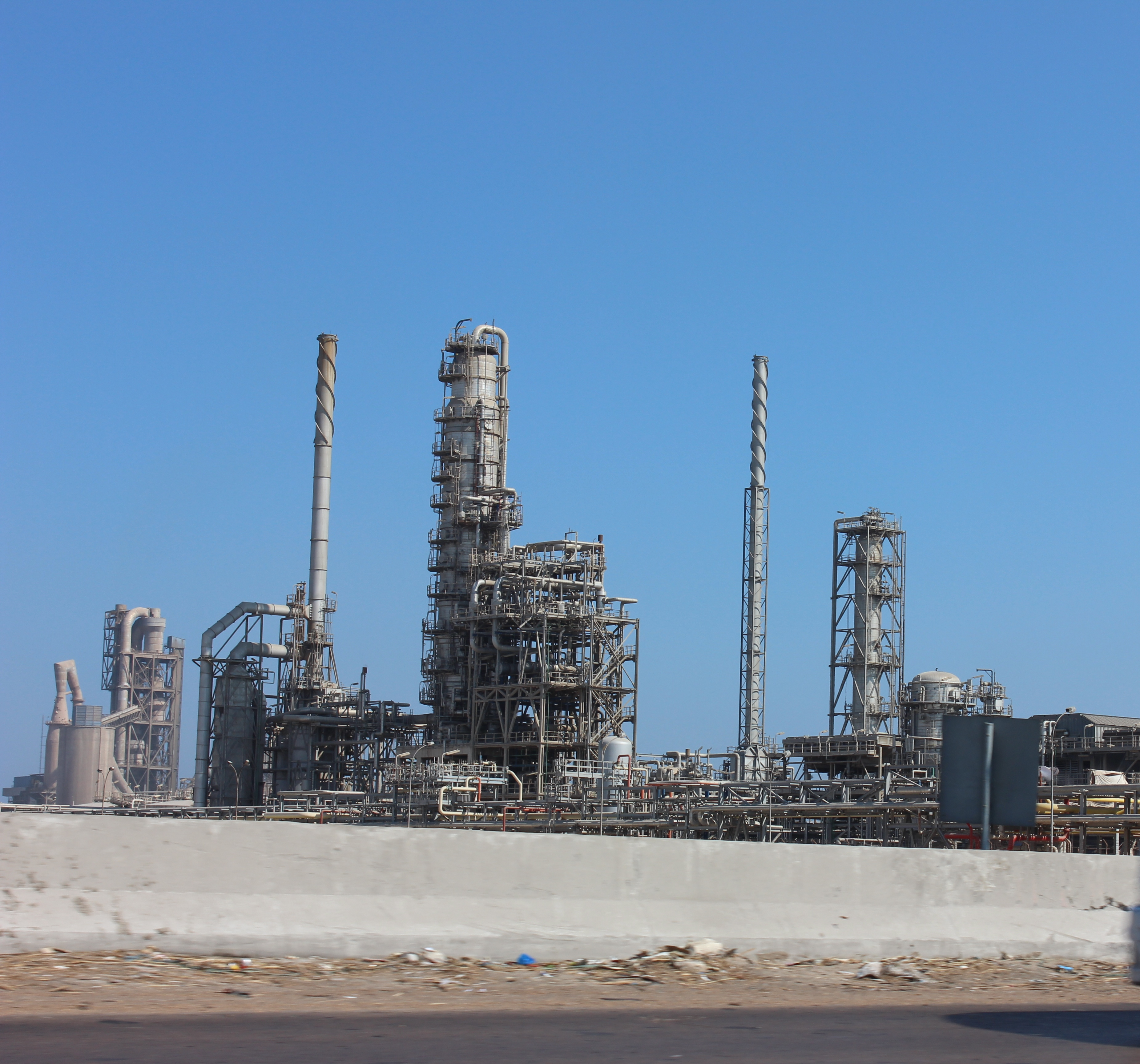 الطريق الدولي الساحلي بالإسكندرية.